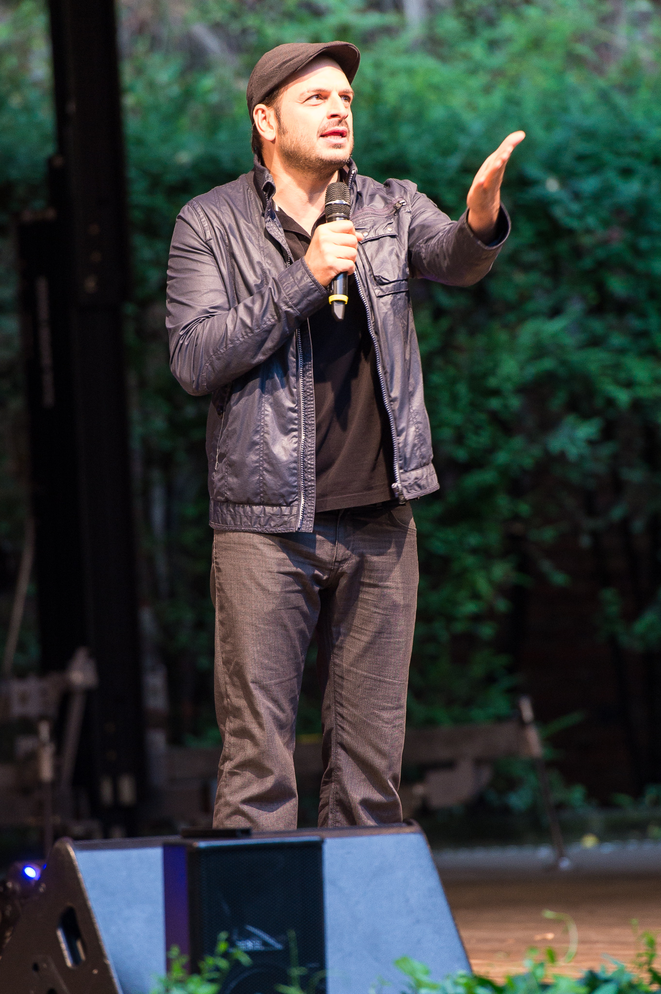 Concertbüro Franken,Kaya Yanar,Serenadenhof